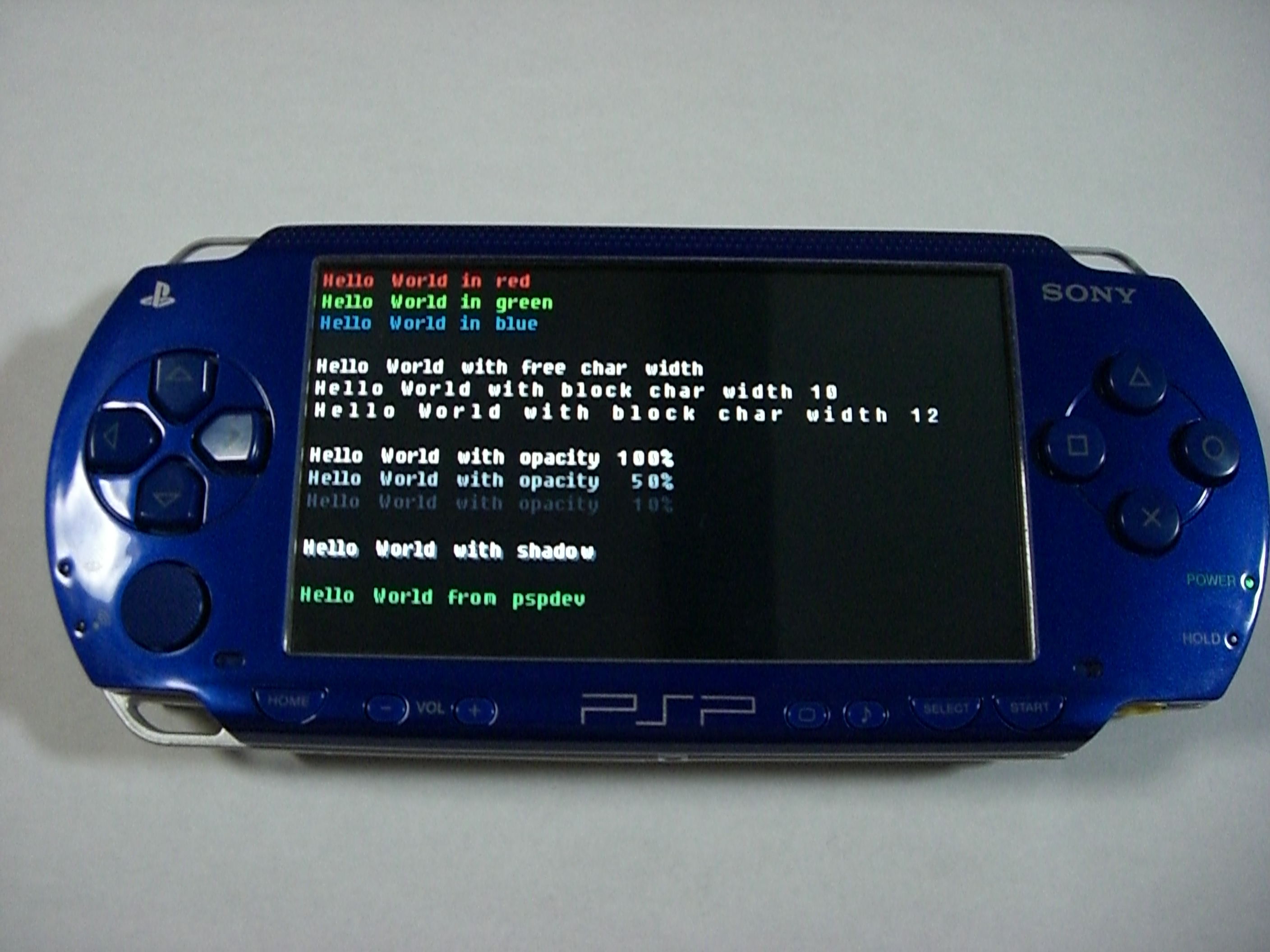 PSPで実行されているHomebrewの画像